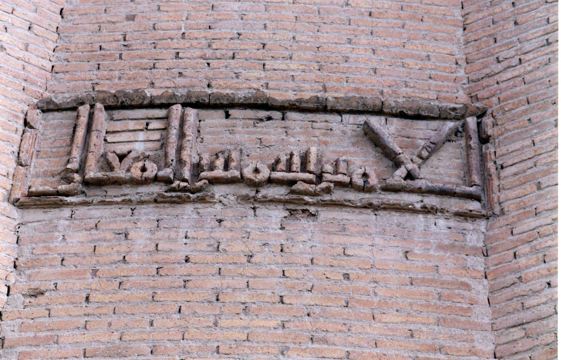 کتیبه